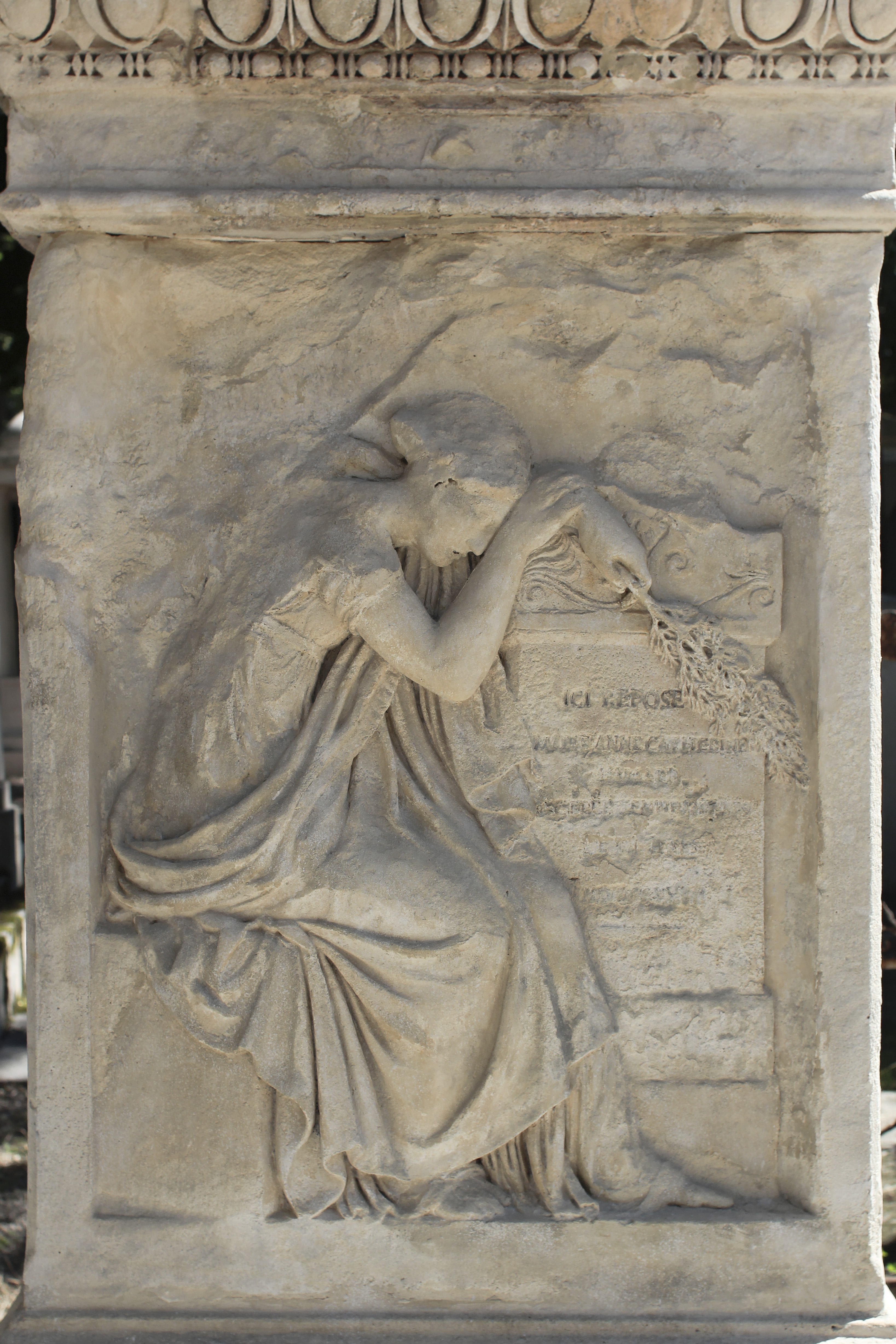 Stèle néo-classique à relief de pleureuse à l'antique tenant de la main gauche une branche de cyprès, la tête appuyée sur une stèle.